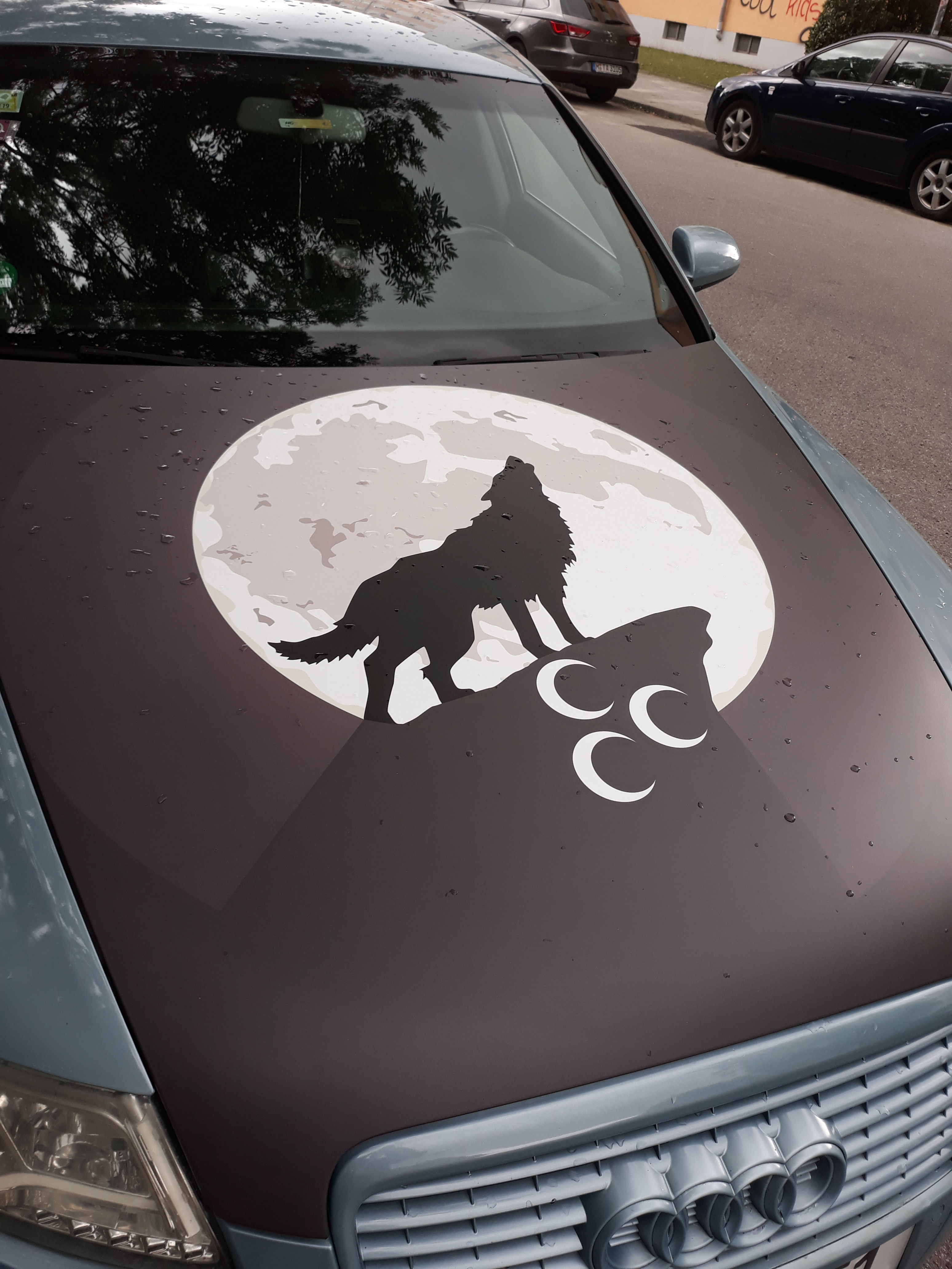 Symbole der Grauen Wölfe auf der Motorhaube eines Autos in München.